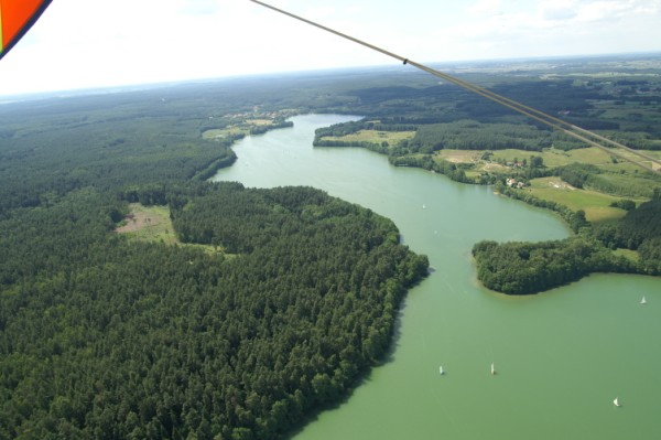 opis grafiki